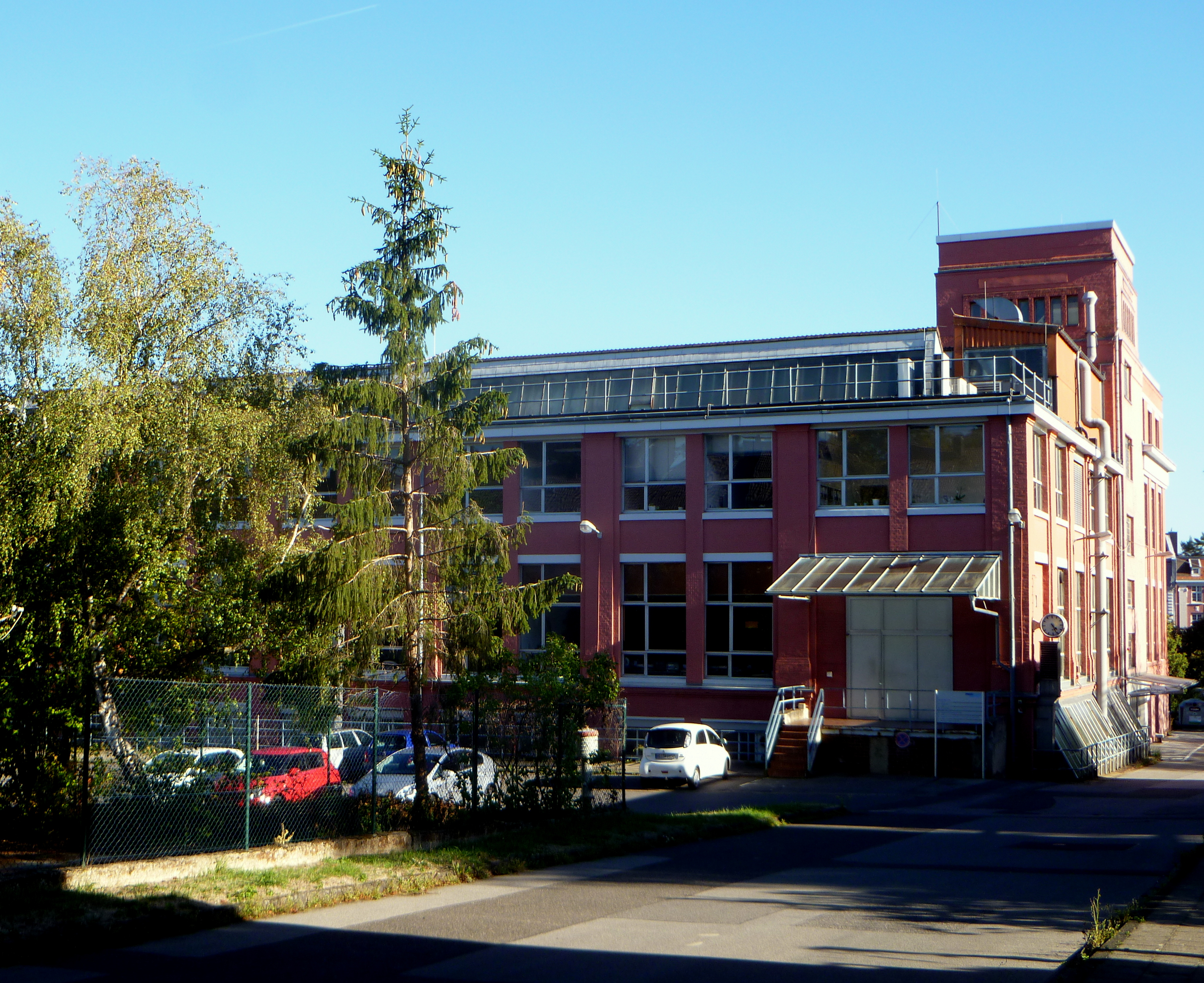 ehem. Tuchfabrik Johann Erckens, Dammstraße Aachen-Burtscheid